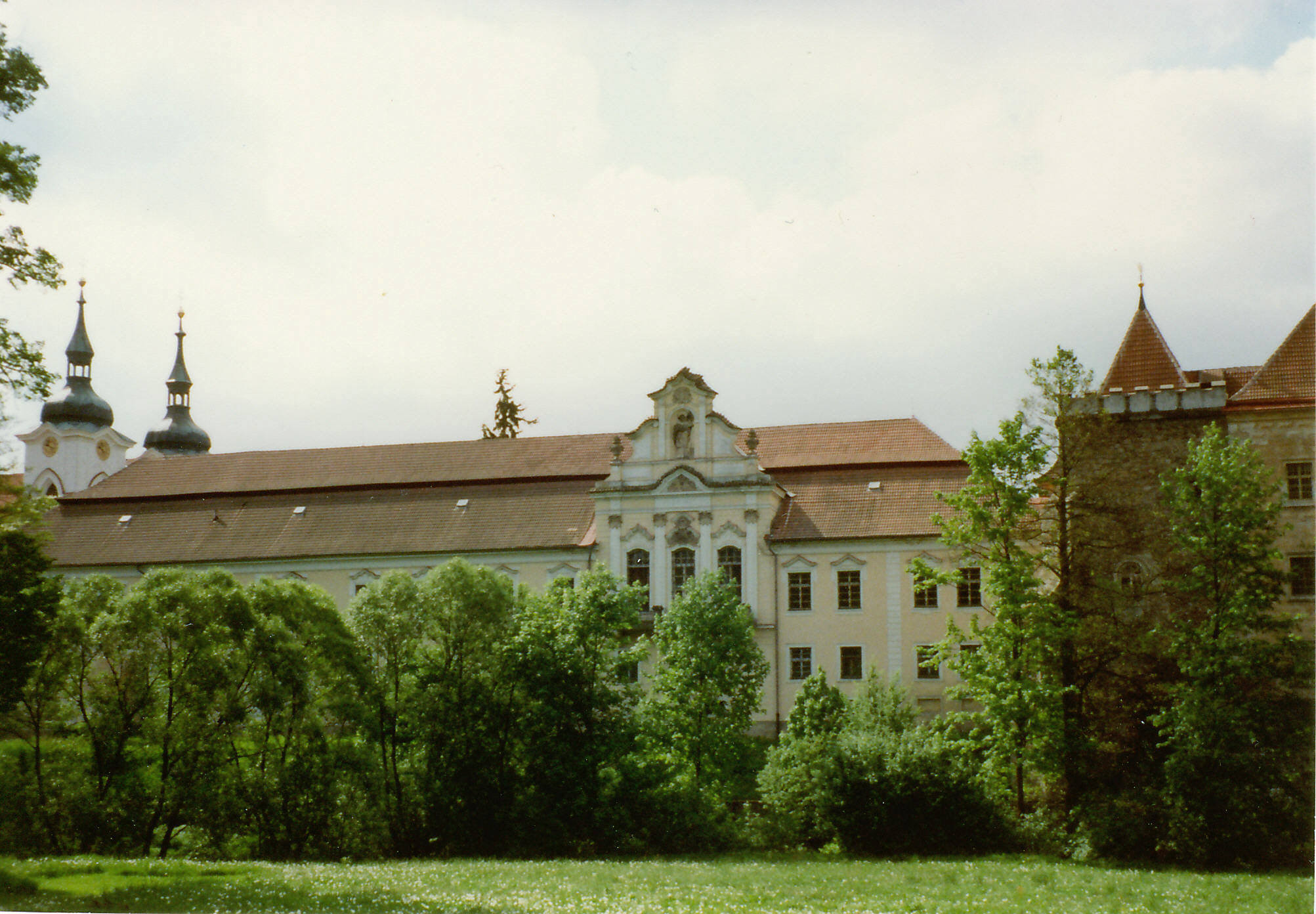 Klosteranlage Želiv, Okres Pelhřimov, Tschechische Republik